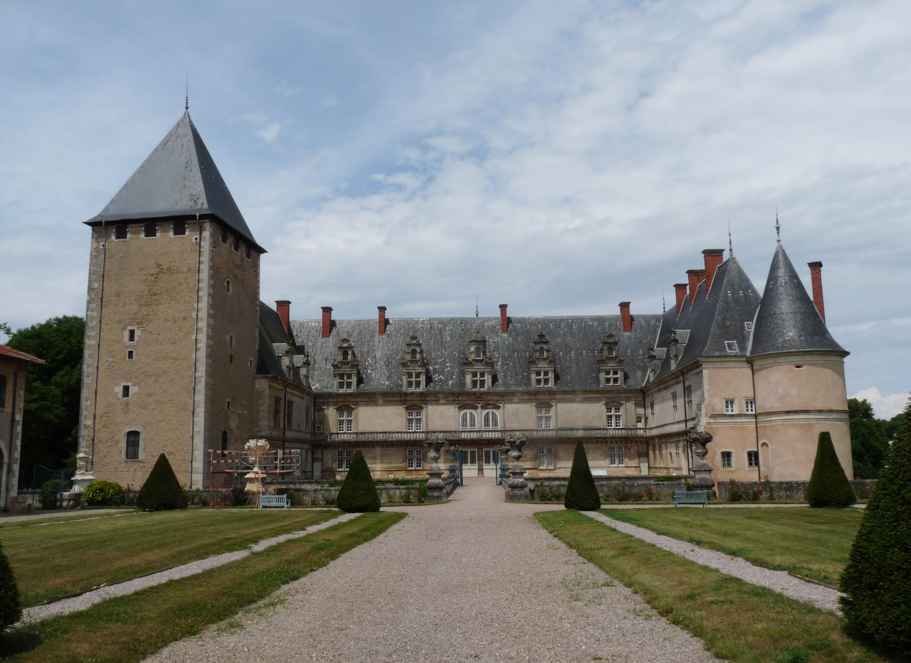 Façade du Château de Fléville (Meurthe-et-Moselle)